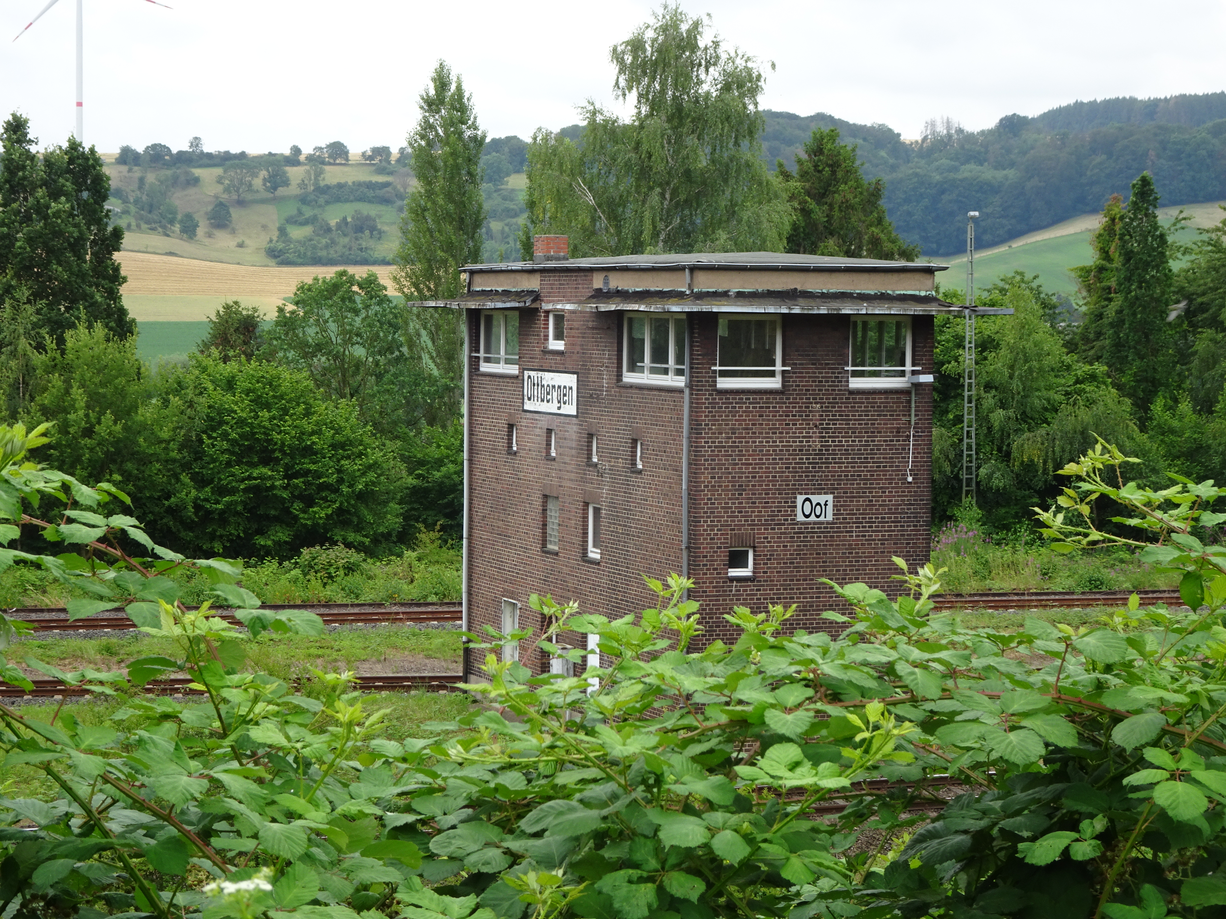 Stellwerk Ottbergen, Juli 2019